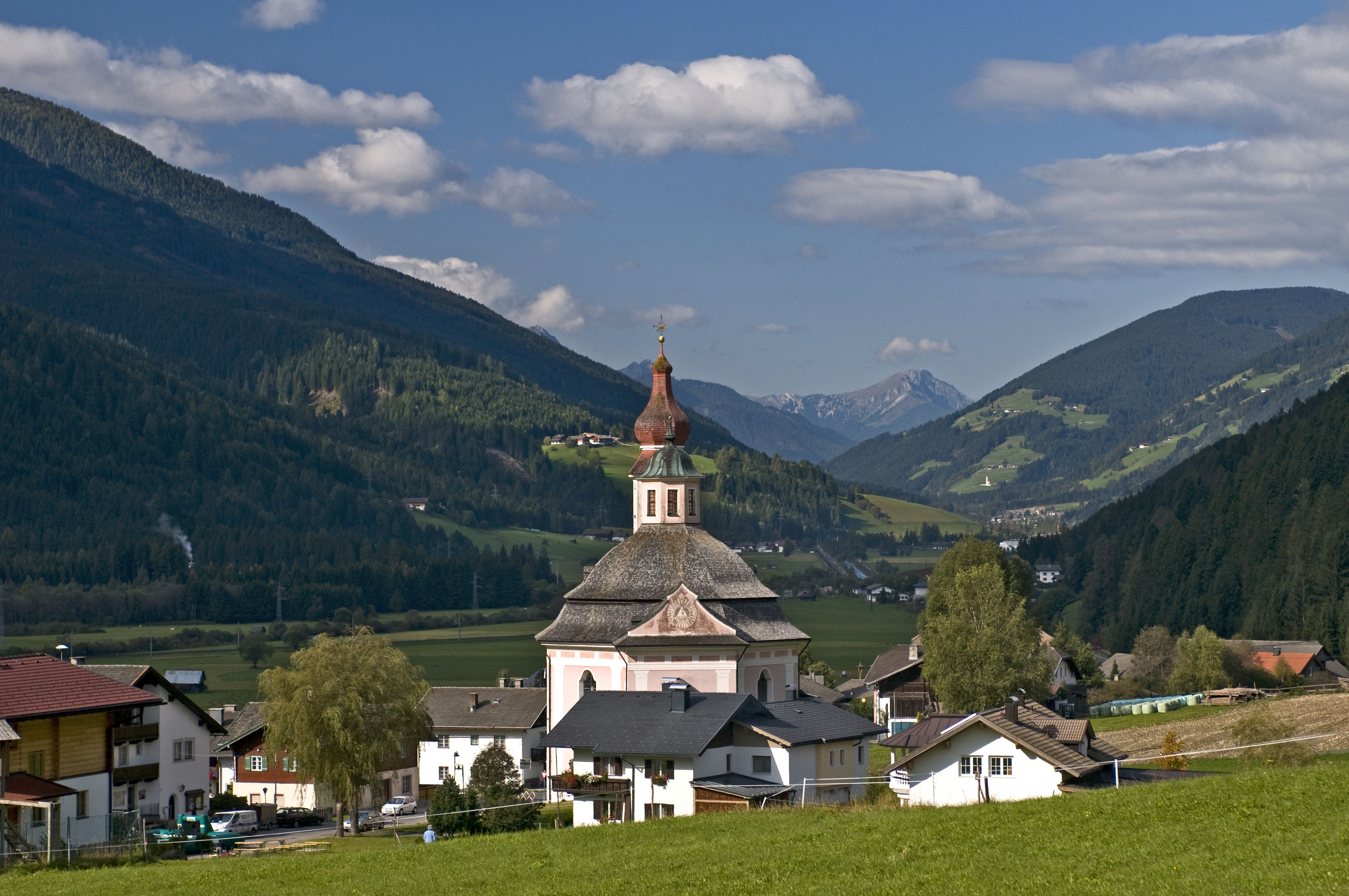 Hochpustertal in Tirol